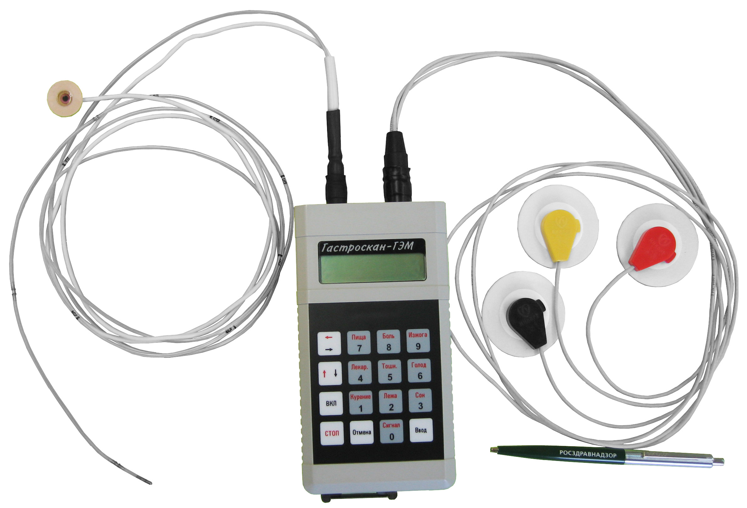 Gastroenteromonitor